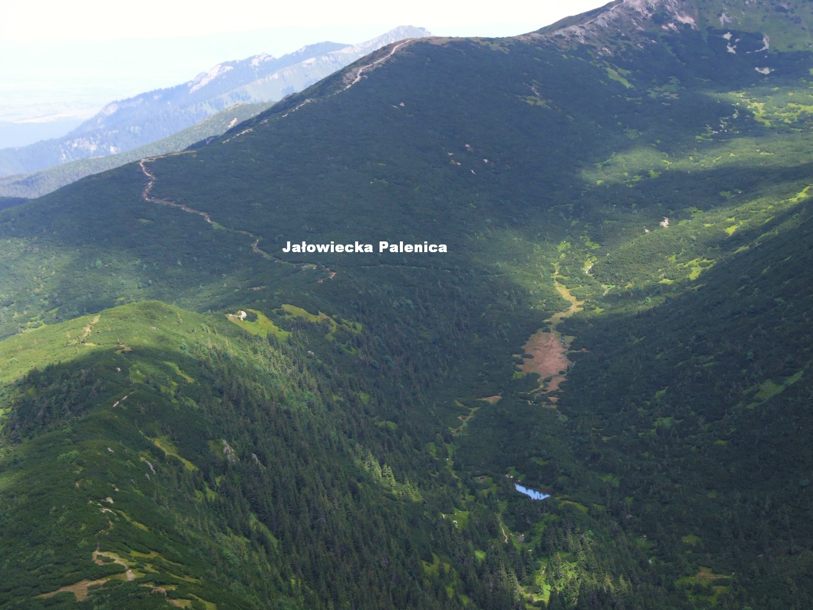 Jałowiecka Palenica i Zuberski Wierch. Widok z Siwego Wierchu